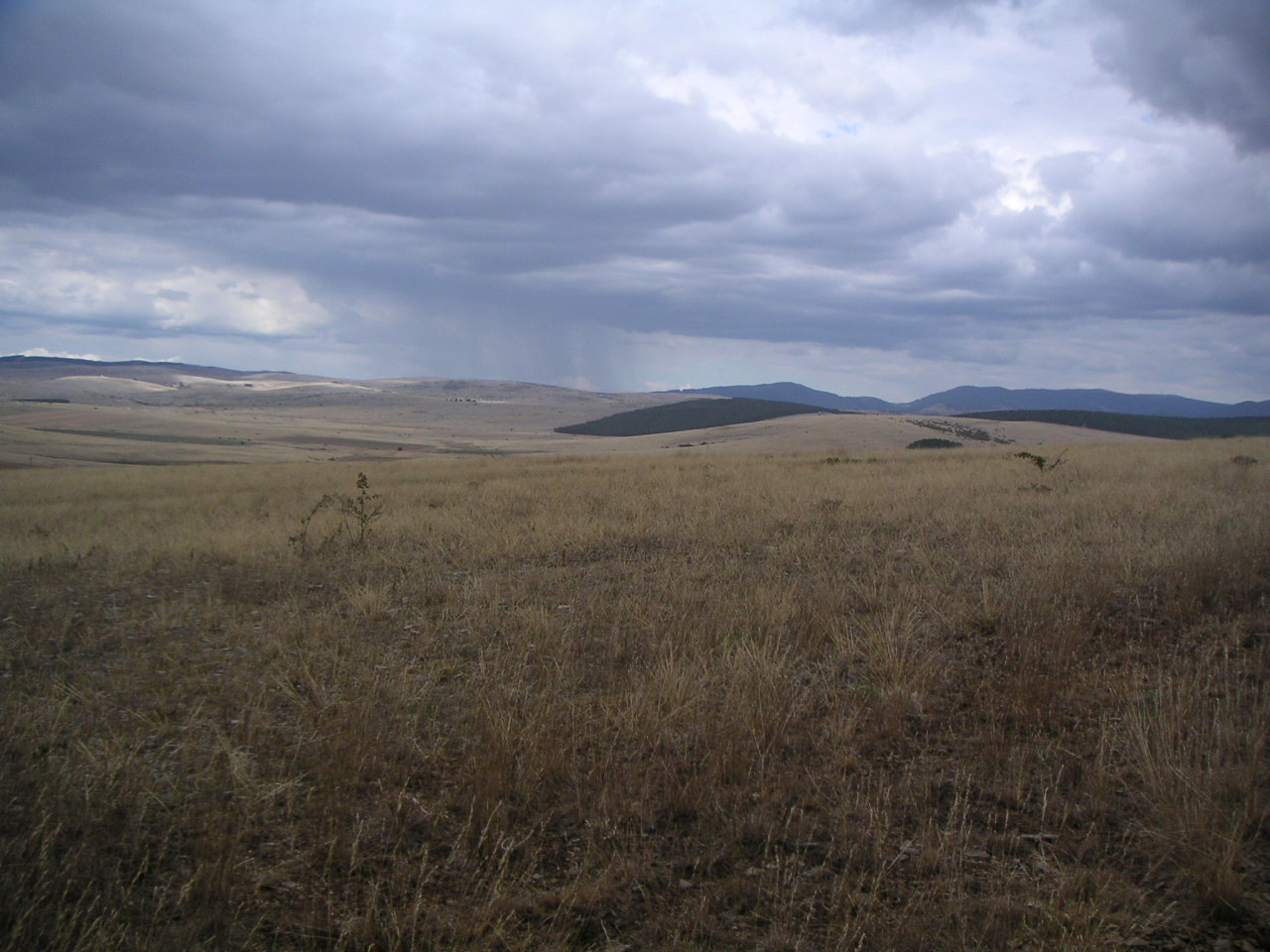 Le Causse Méjean sous la pluie en été